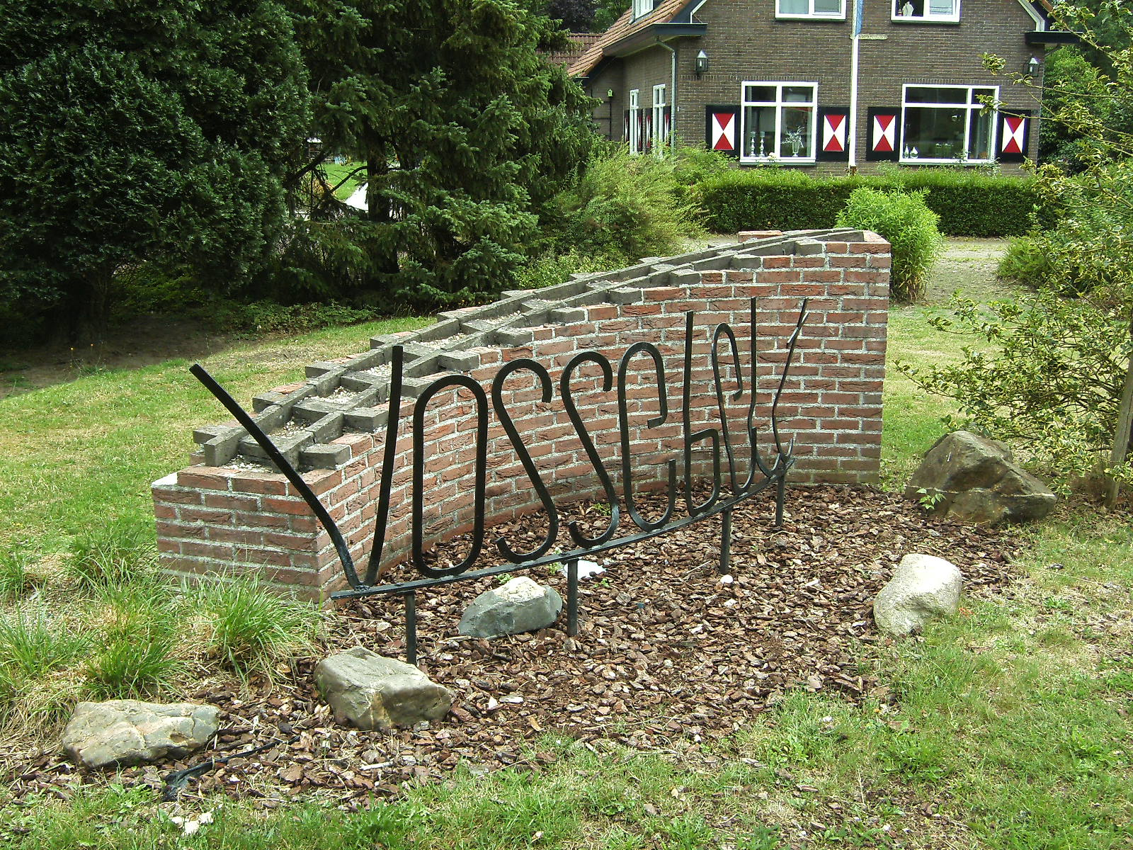 Object ter herinnering aan de spoorlijn Deventer-Ommen die vroeger op deze plaats lag. Geplaatst in 1995 ter gelegenheid van het 25 jarig bestaan van buurtvereniging 'de Vossebelt'